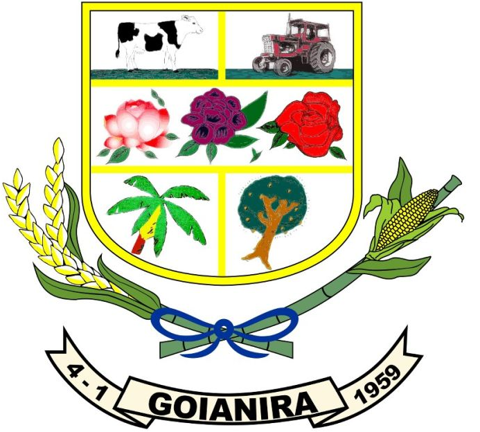 Bandeira de Goianira, Goiás, Brasil